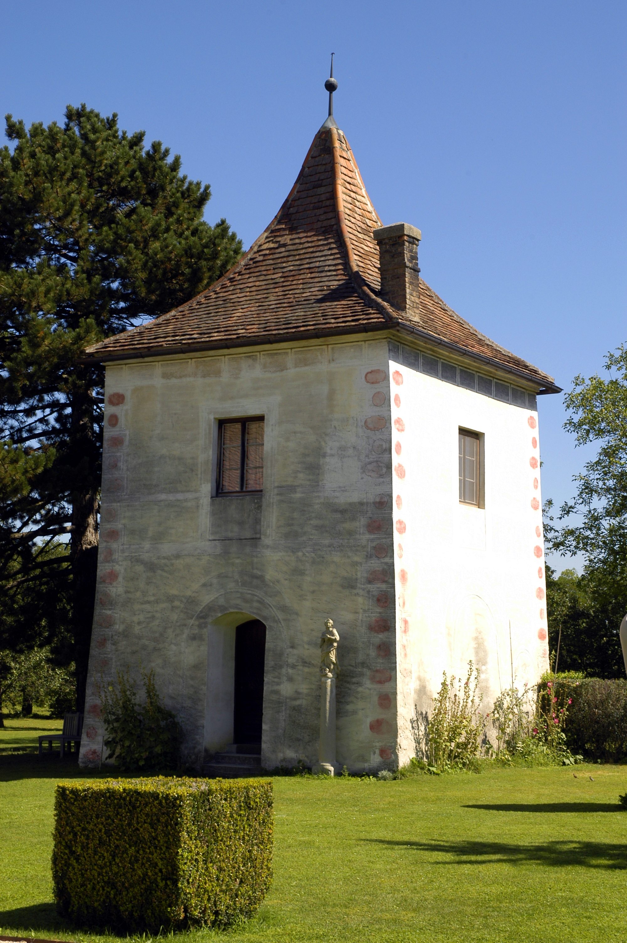 Schloss Limberg / Stöckl